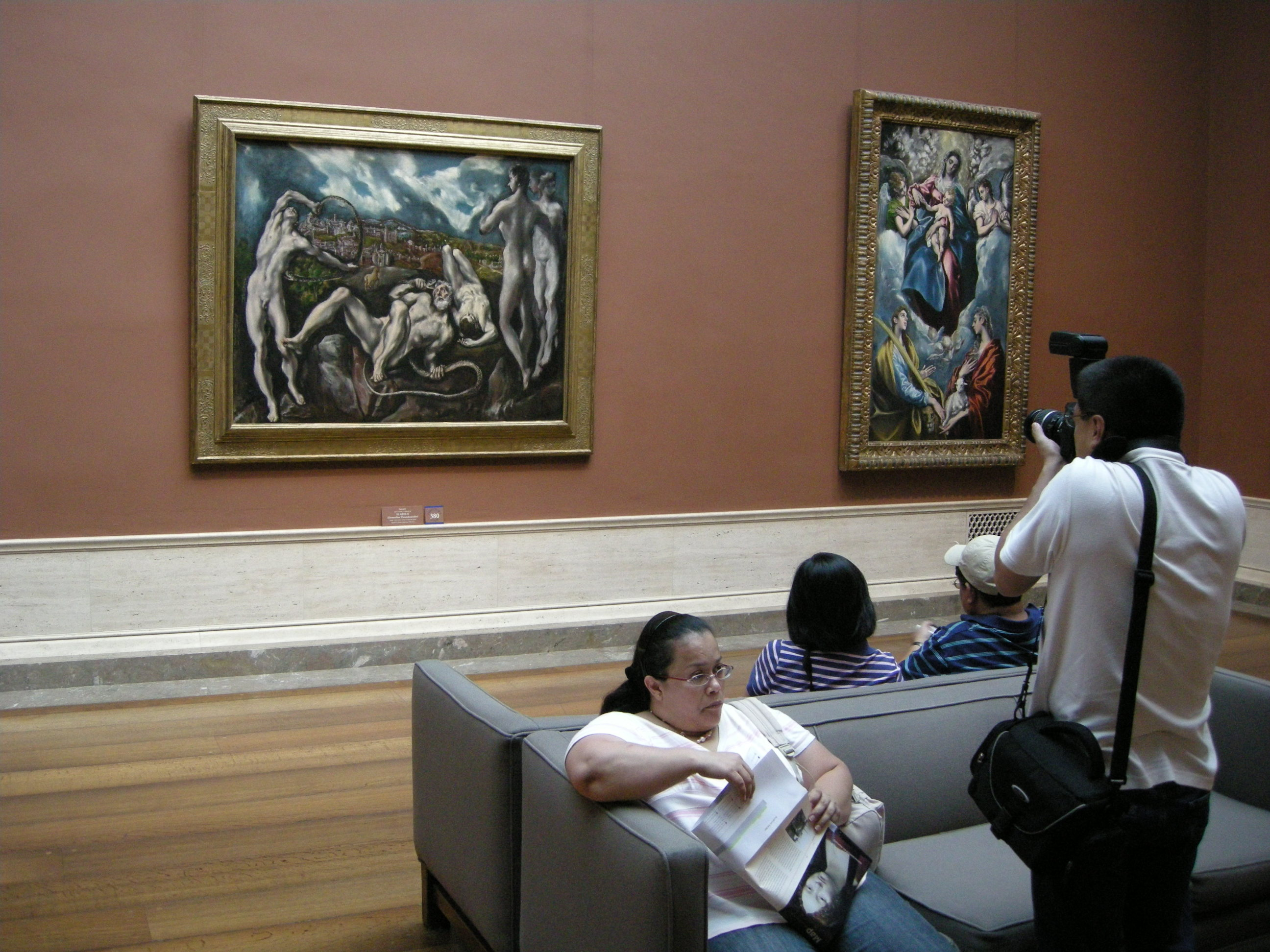 Nga, sala di el greco